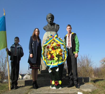 Відкриття пам'ятника в селі Берлин